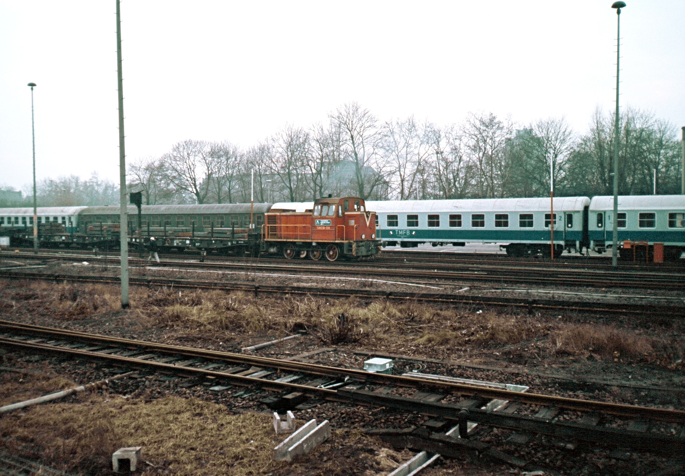 TGM 23 B und Reisezugwagen der französischen Streitkräfte im Bahnhof Tegel